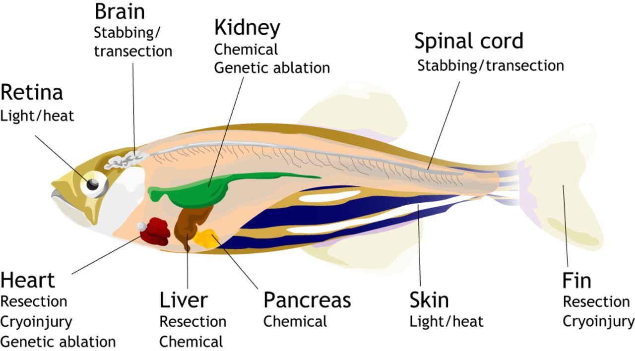 Bagian-bagian tubuh ikan zebra